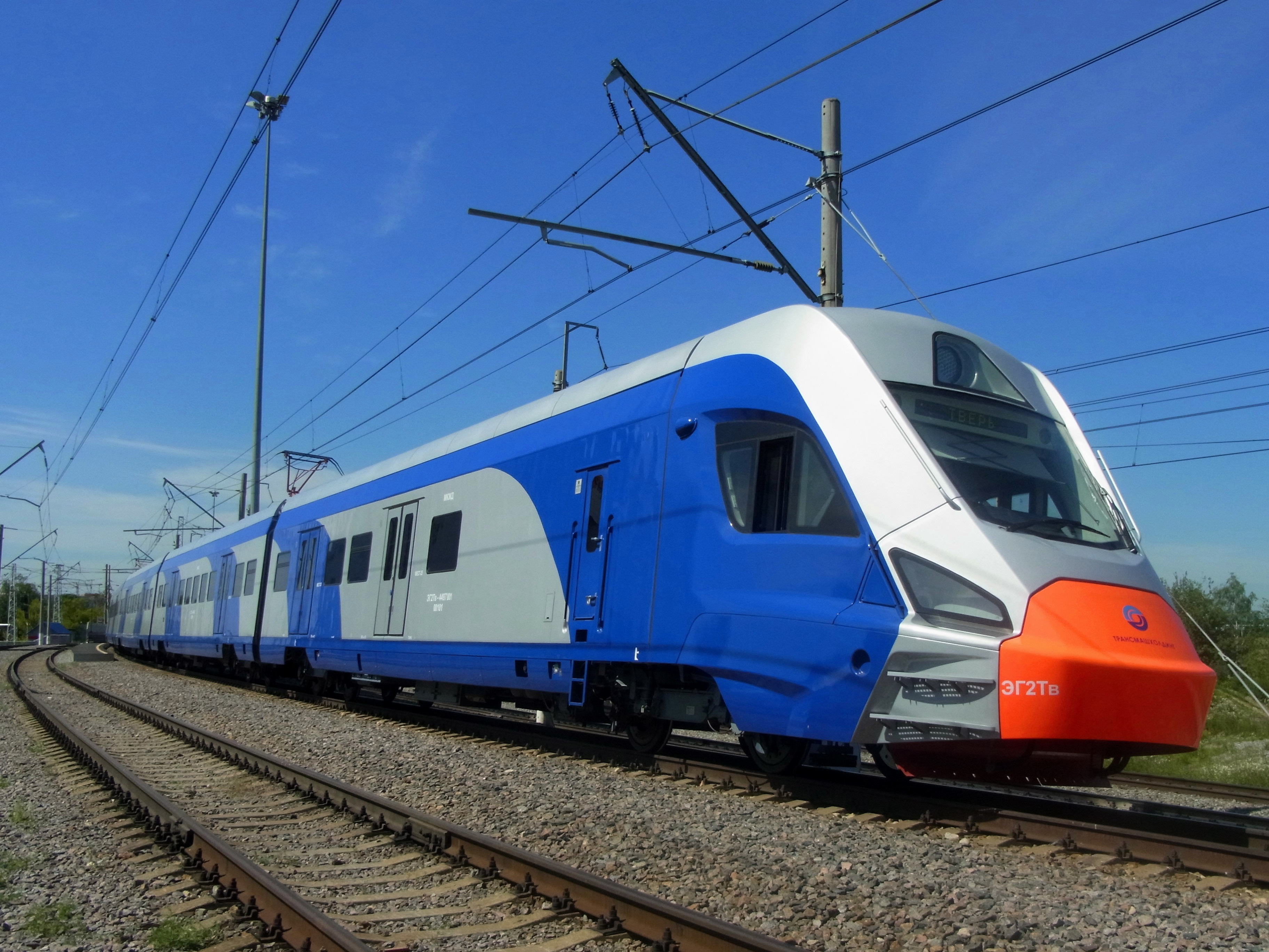 Электропоезд ЭГ2Тв-001 на платформе кольца ВНИИЖТ в Щербинке